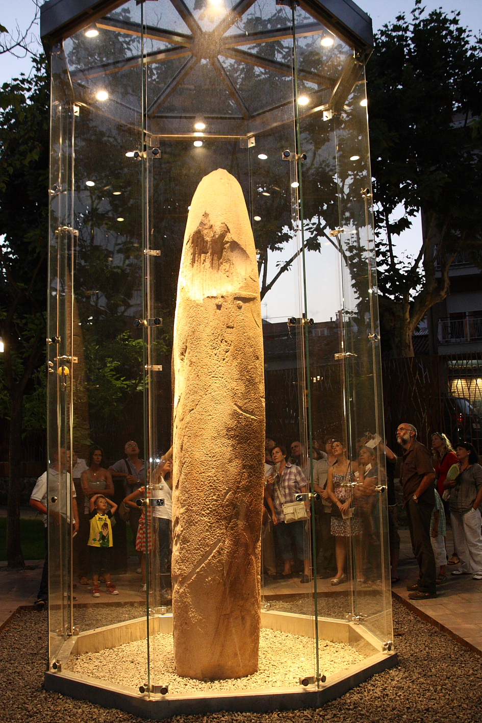 Imatge general del menhir de Mollet en la seva ubicació actual, el Parc de Can Mulà